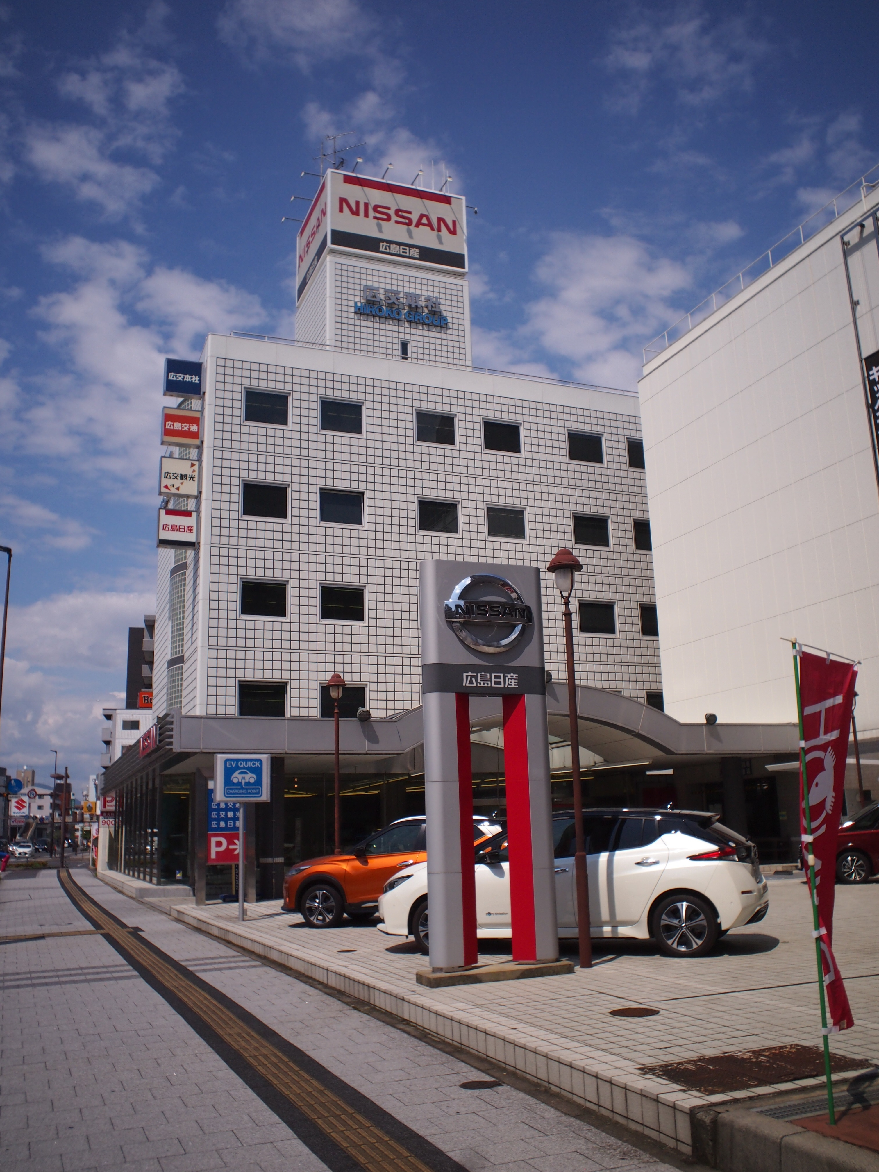 広交本社